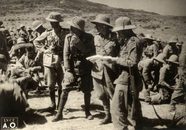 Gli ufficiali del terzo battaglione della divisione Sila durante la battaglia per la conquista dell'Amba Aradam consultano le carte mentre i soldati hanno un momento di riposo.